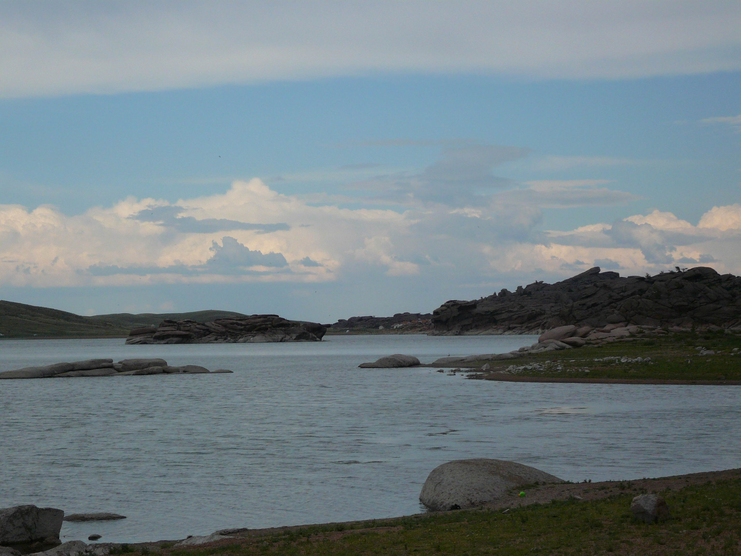 Lake Toraigyr